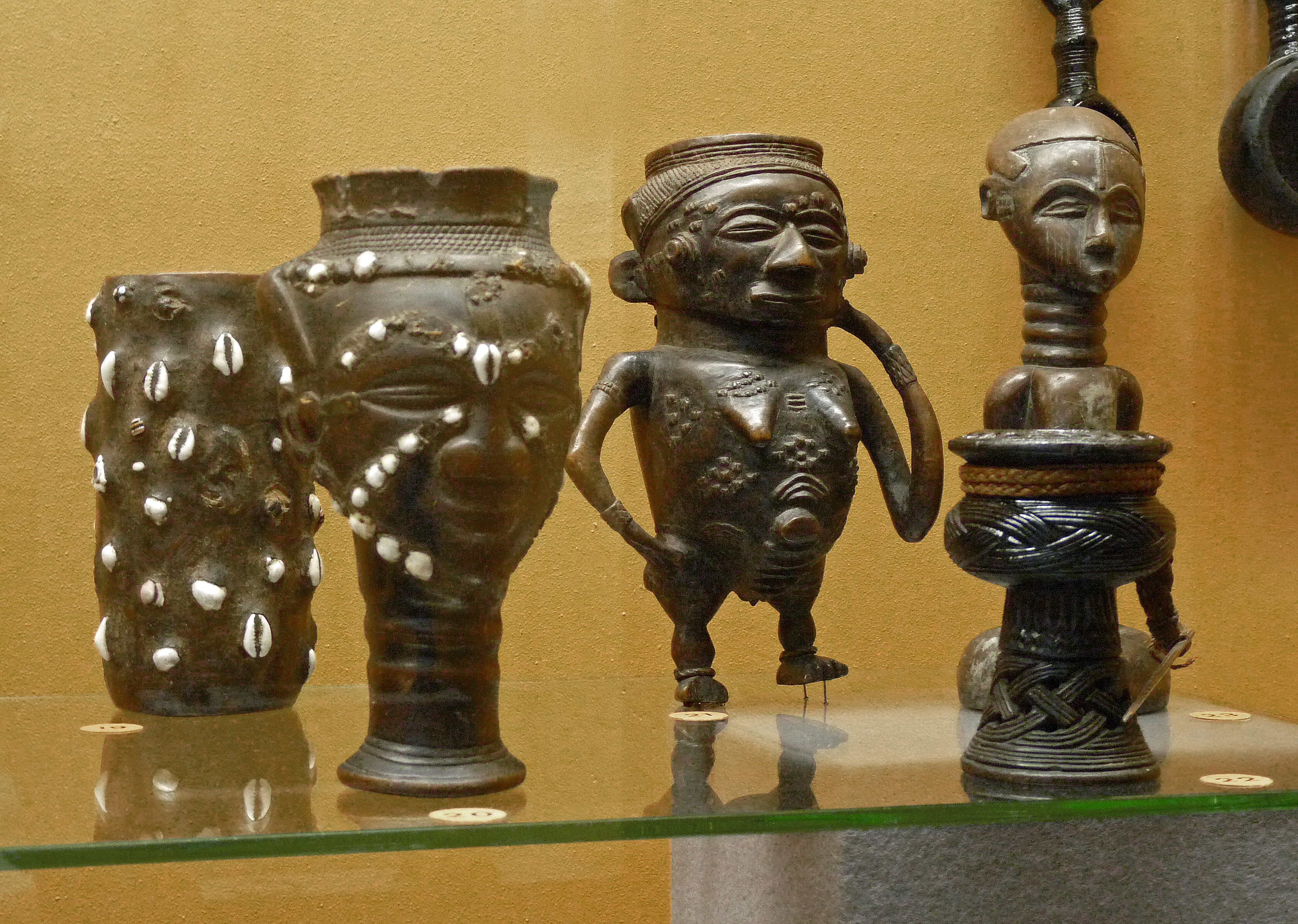 Kuba : récipients et figurines en bois sculpté. Musée royal de l'Afrique centrale